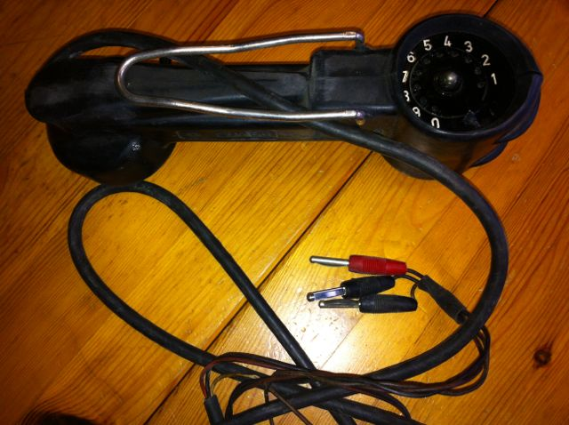 Handapparat mit Wählscheibe und Bananensteckern. Ich meine mich zu erinnern, derlei bei Postlern gesehen zu haben, die in den 1970ern an den Kästen auf der Straße die Leitungen zu prüfen hatten.